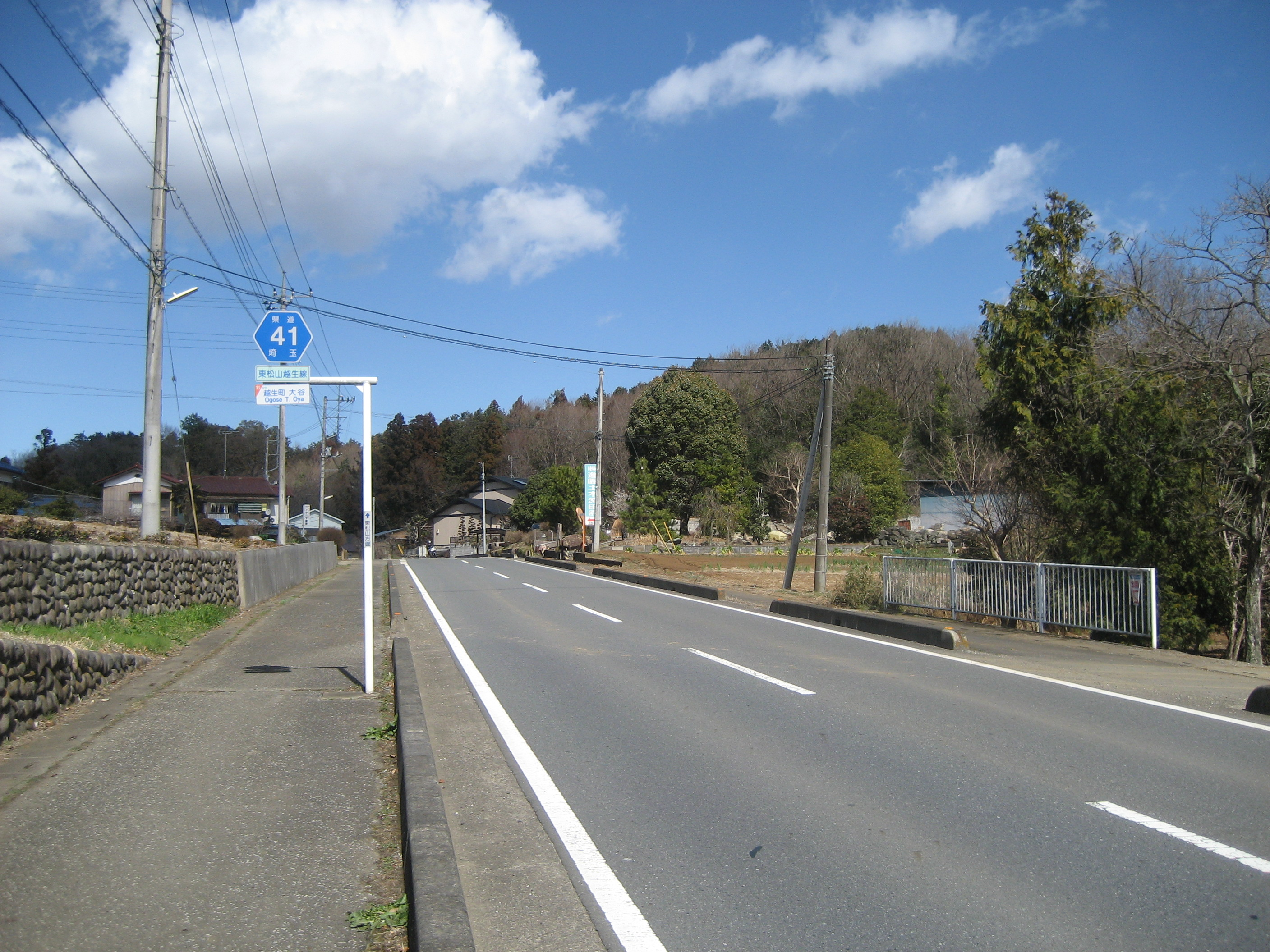 埼玉県道４１号線越生町内